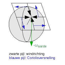 Corioliseffect